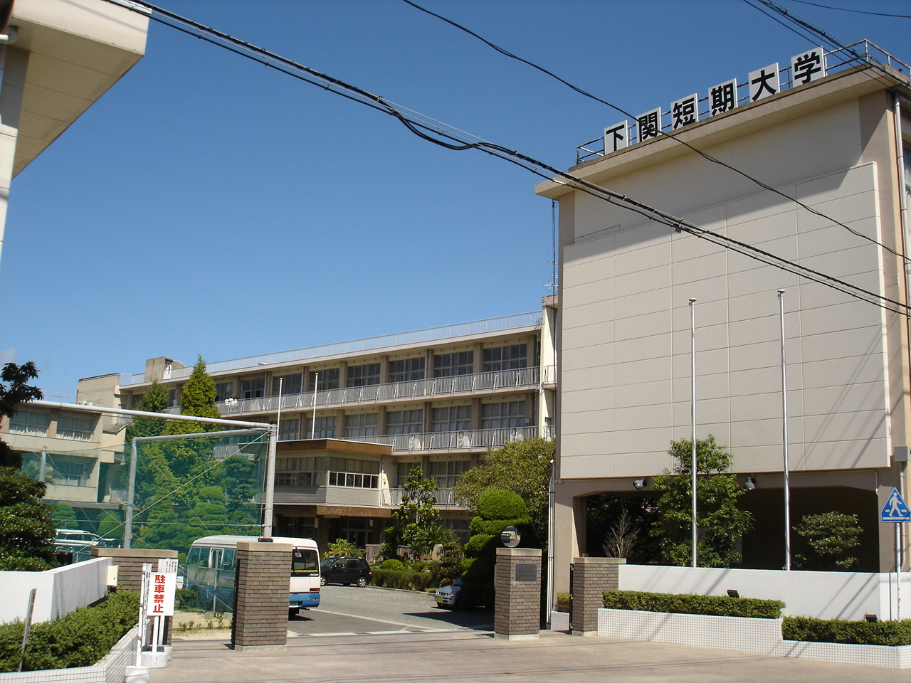 下関短期大学